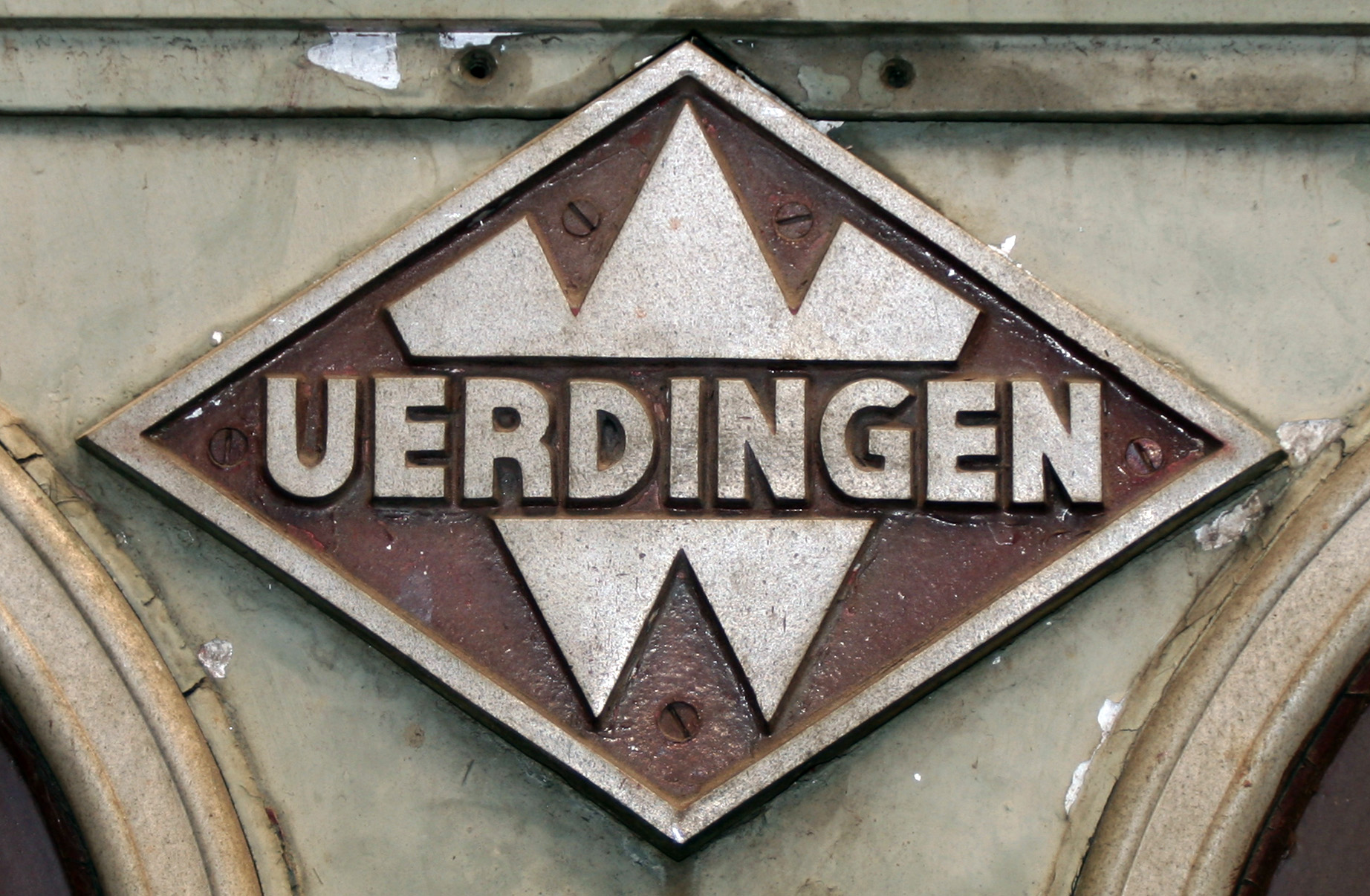 Template:Typenschild Uerdinger Schienenbus